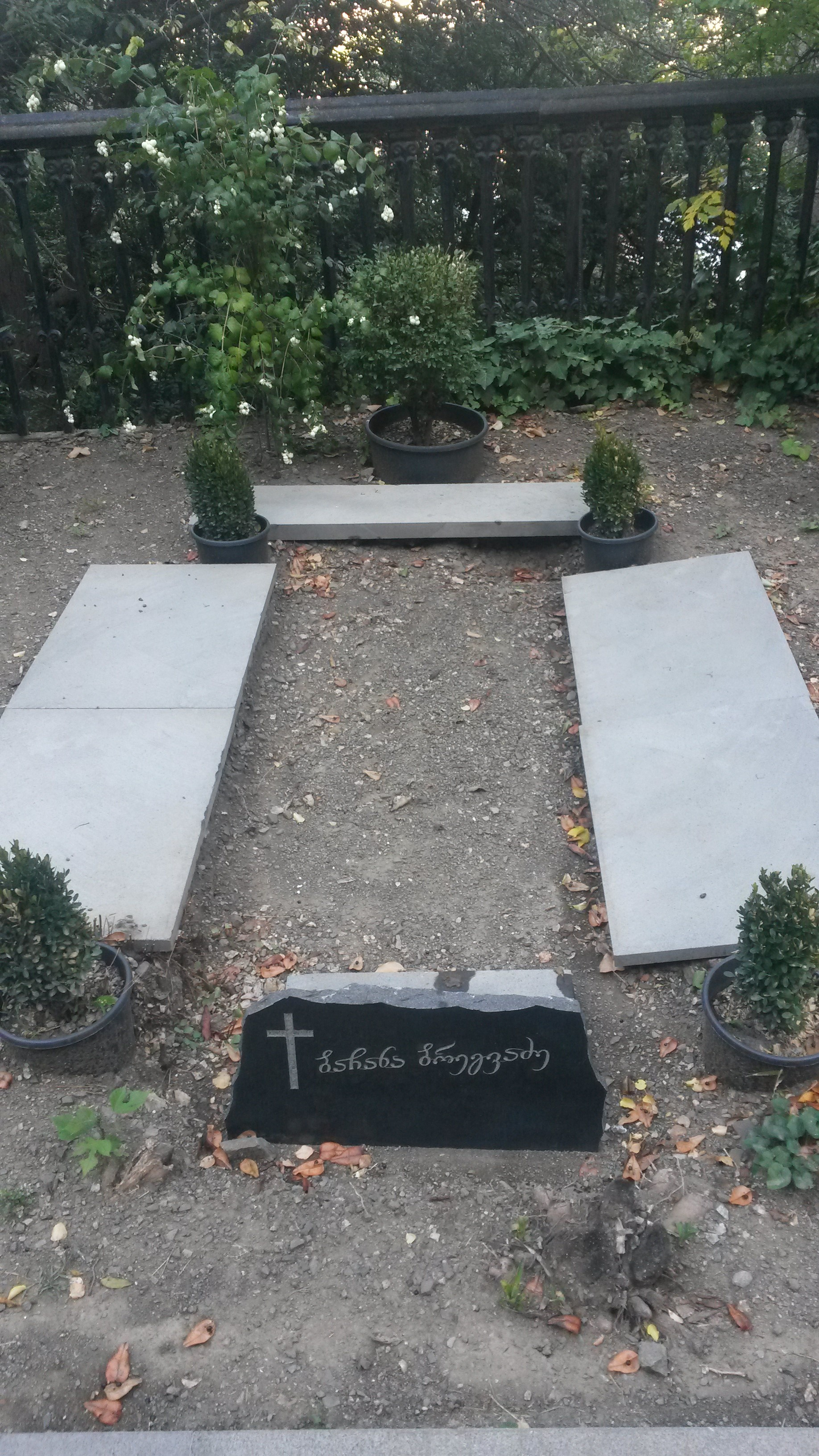 მთაწმინდის პანთეონი